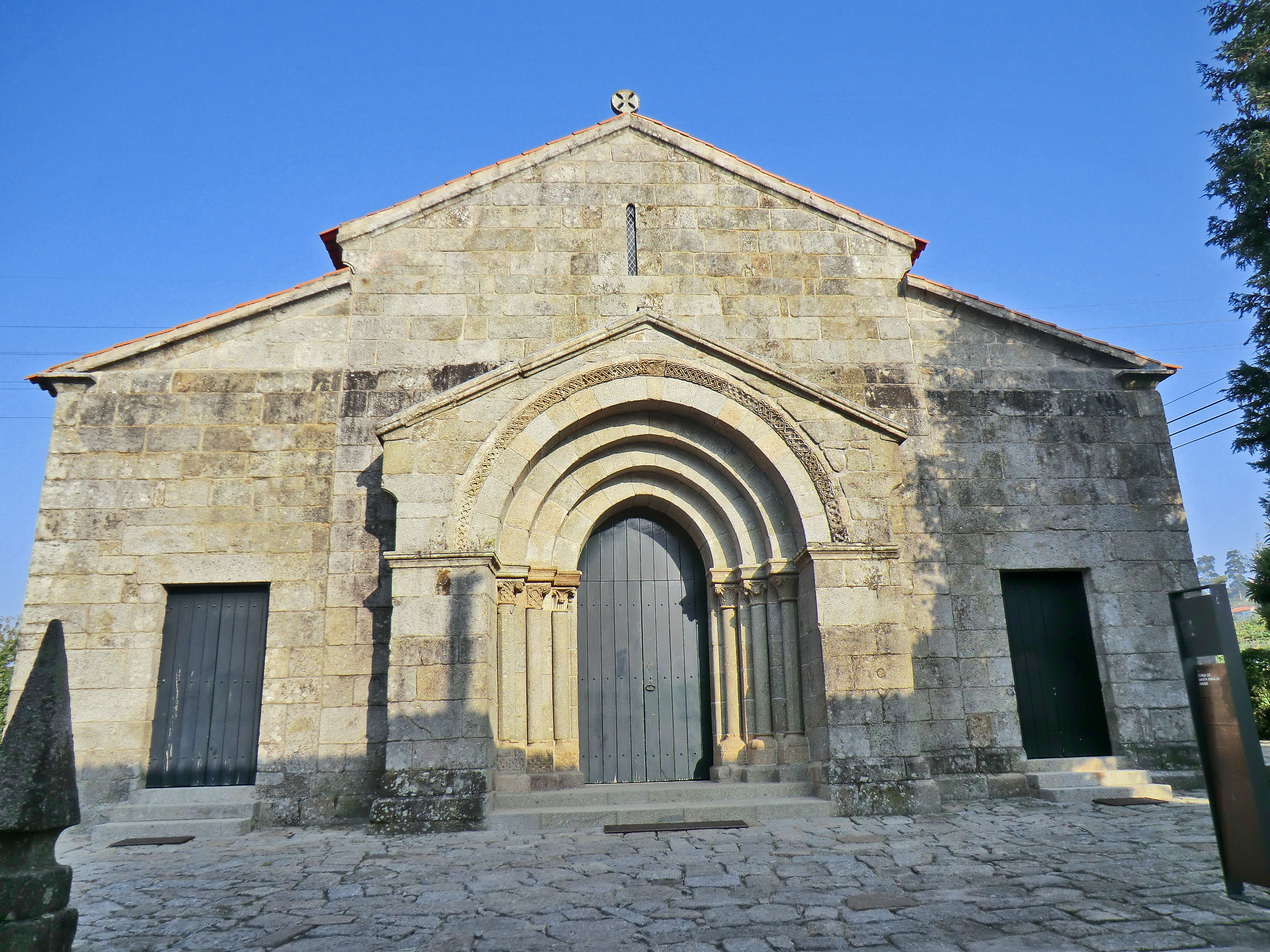 Igreja de Santa Maria de Airães This file was uploaded for Wiki Loves Monuments in Portugal with the unique identifier 71193.